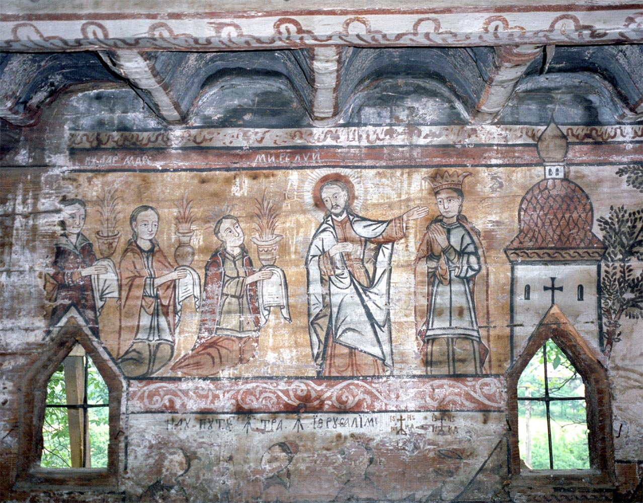 Ieud Deal: pictura murală pe peretele sudic în pronaos, scena reprezintă pilda celor zece fecioare. Cinci fecioare înţelepte cu candele aprinse sunt întâmpinate de Isus (mirele) pentru a fi primite în biserica Ierusalimului, reprezentată atât printr-o mireasă cât şi prin biserica din jurul ferestrei. Foto: Alexandru Baboş, iulie 1997.